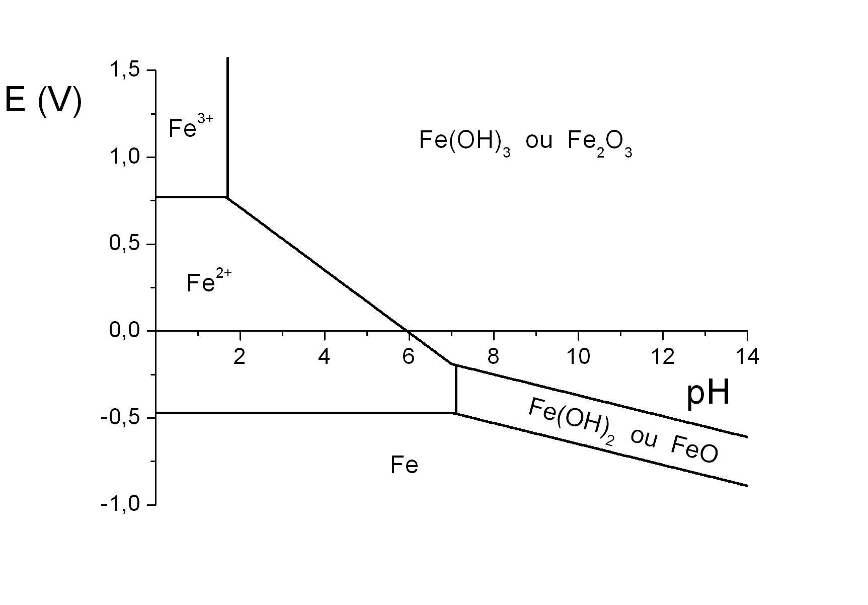 Diagamme potentiel-pH (diagramme de Pourbaix) de l'élément fer à 25°C en milieu aqueux (simplifié). Diagramme réalisé par Utilisateur:David Berardan